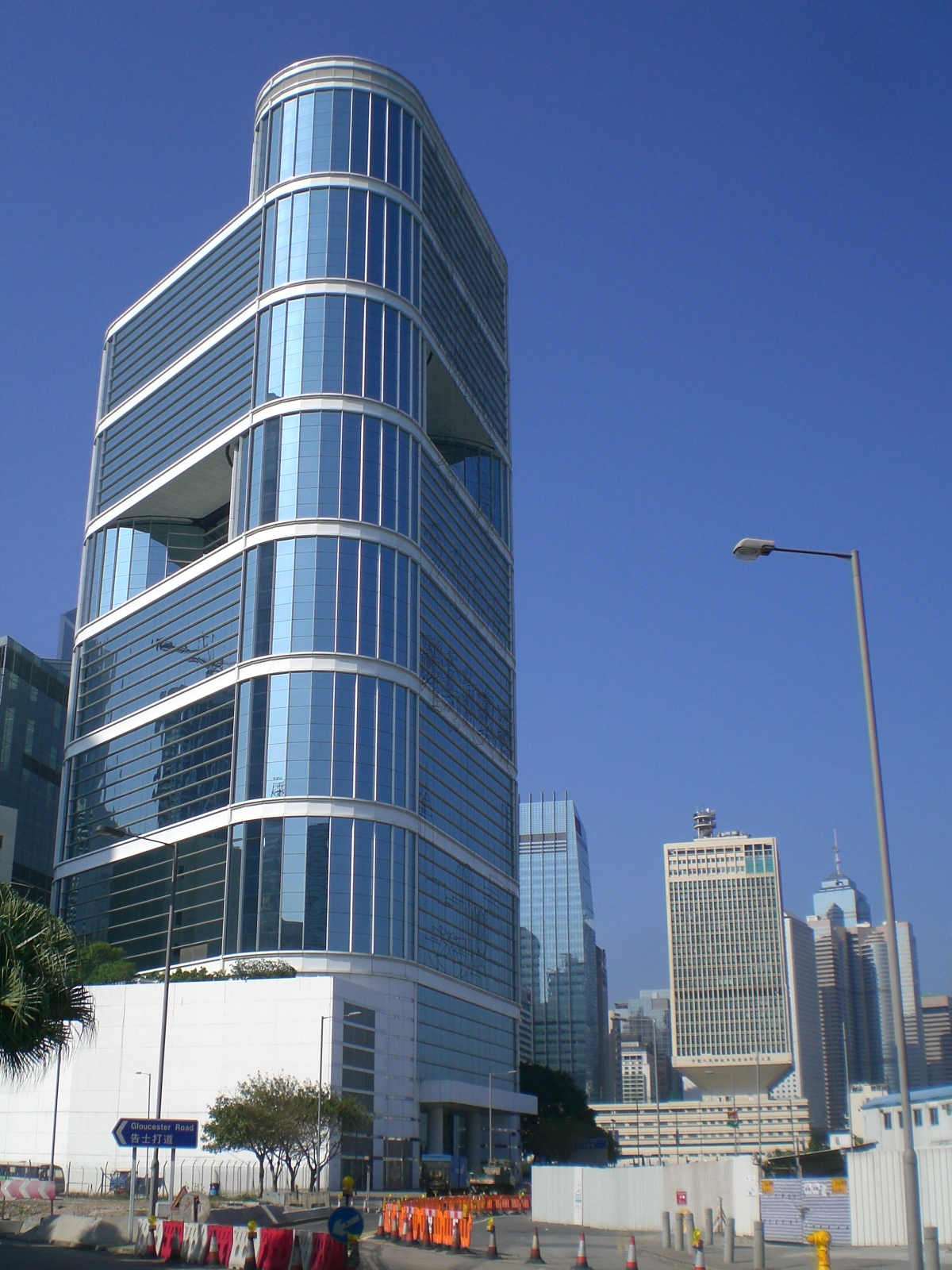 中信大廈 & 中國人民解放軍駐港部隊大廈